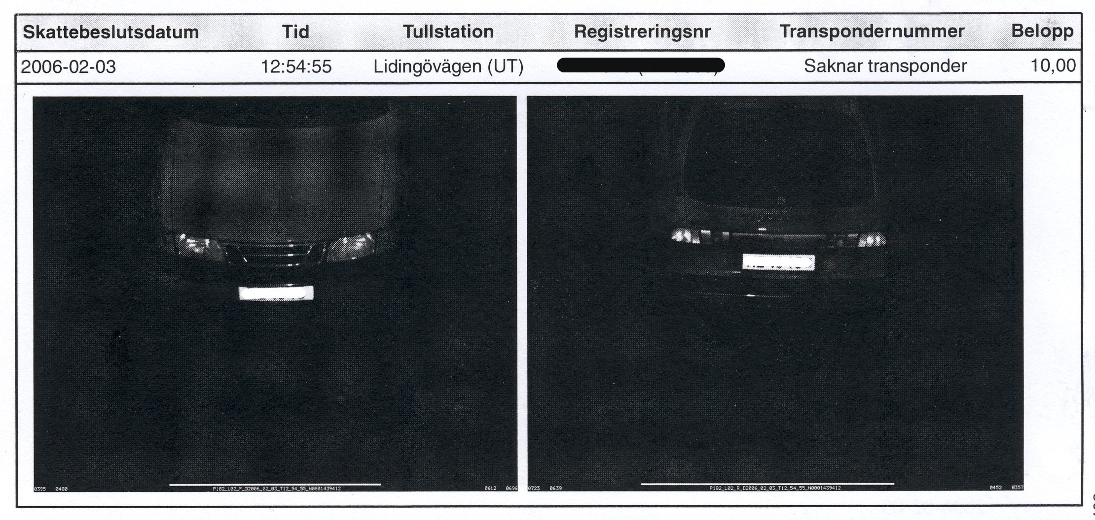 Utdrag (bild) visande passagen för ett skattebeslut för trängselskatten i Stockholm